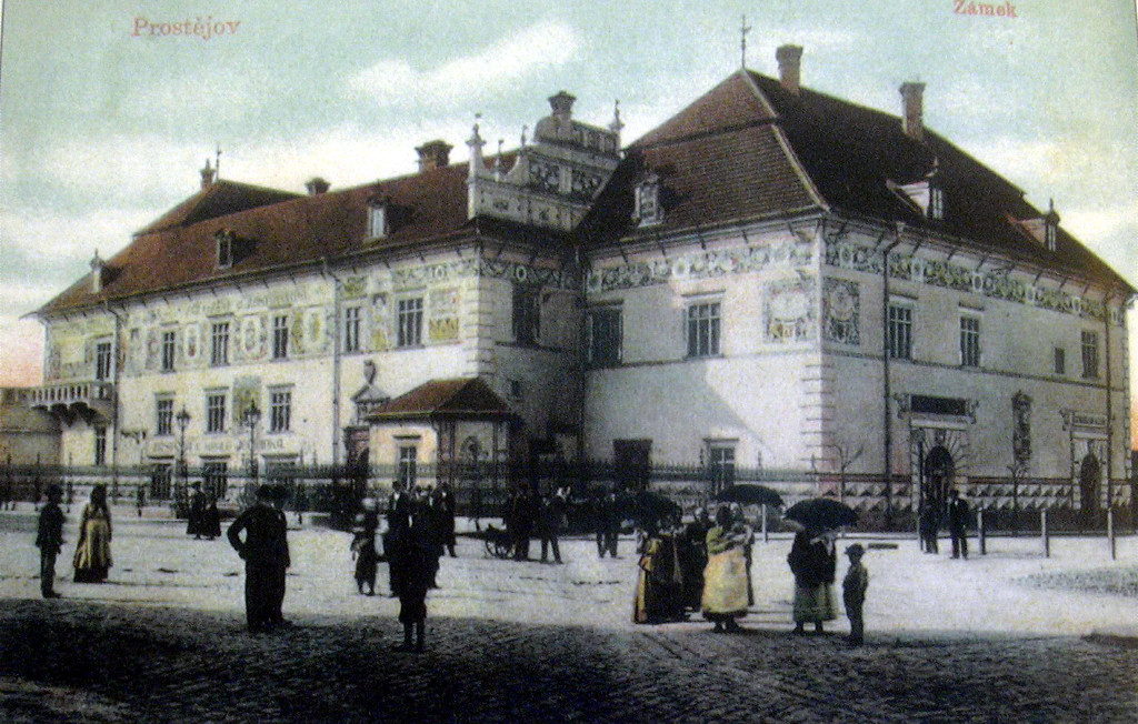 Prostějovský zámek, foto rok 1903 (Prostějov - Czech Republic)